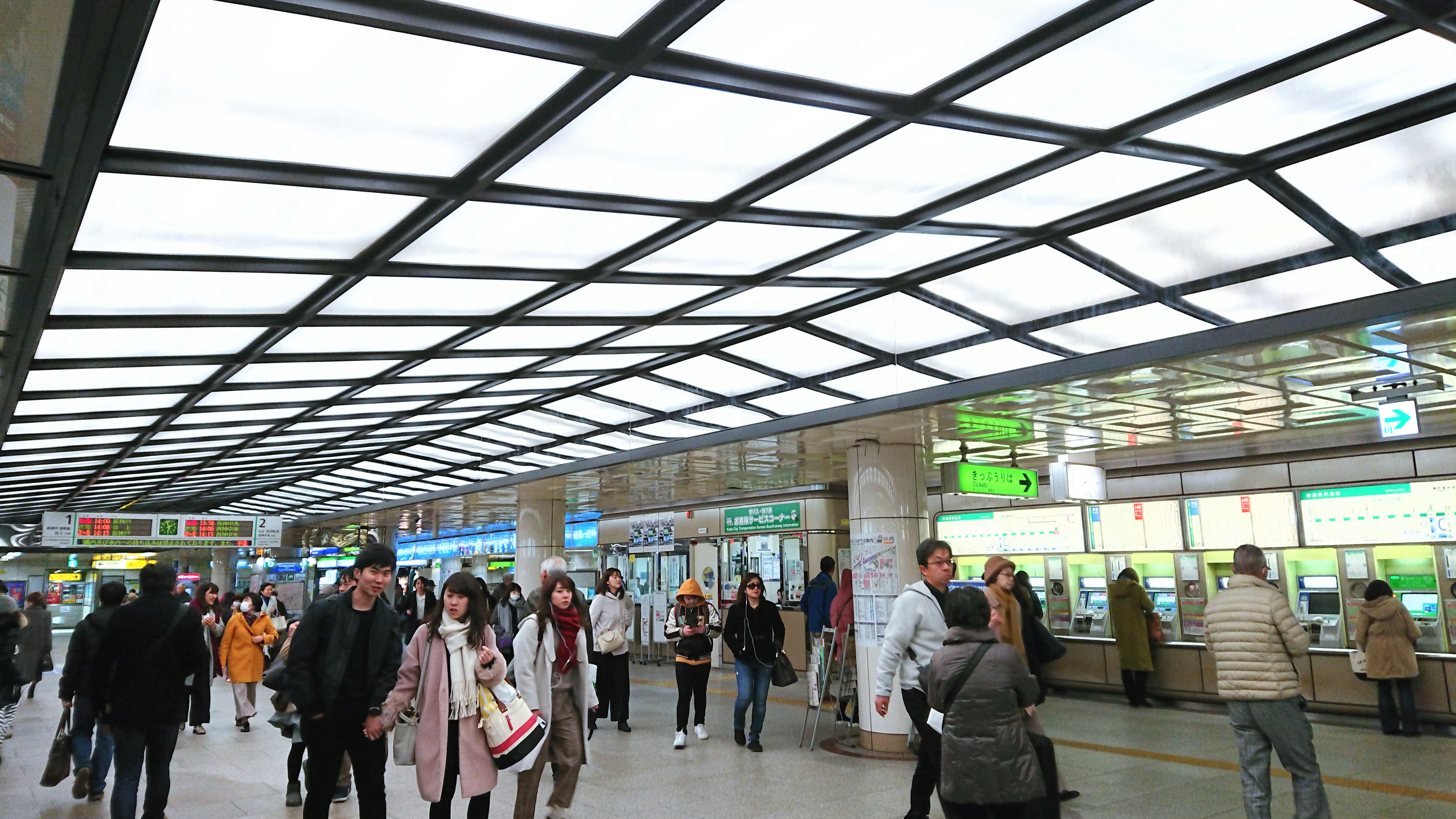 神戸市交通局（神戸市営地下鉄）山手線（西神・山手線）S03 三宮駅 東改札口